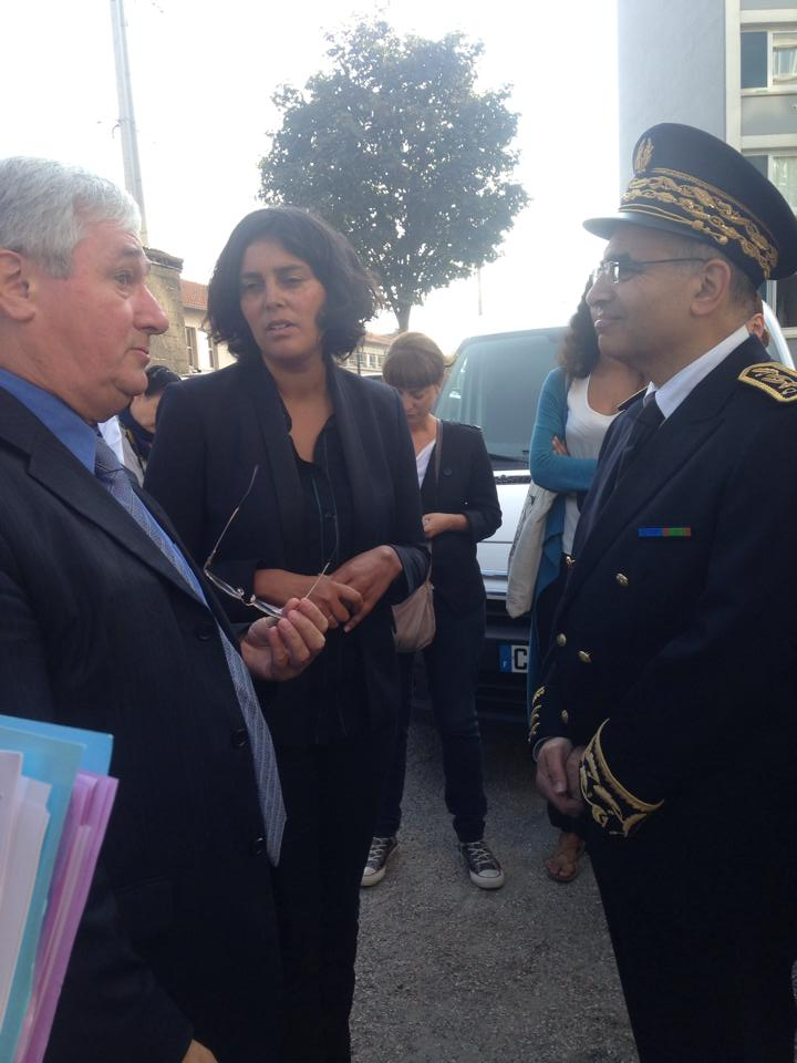 La secrétaire d'Etat à la ville Myriam El Khomri (au centre), le préfet Philippe Galli (à droite) et le maire de Pierrefitte Michel Fourcade (à gauche) lors d'une visite à Pierrefitte-sur-Seine le 9 septembre 2014.